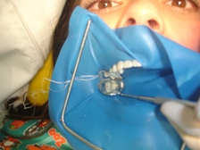 Aislamiento realizado en la Clinica de Estomatología BUAP (2007)